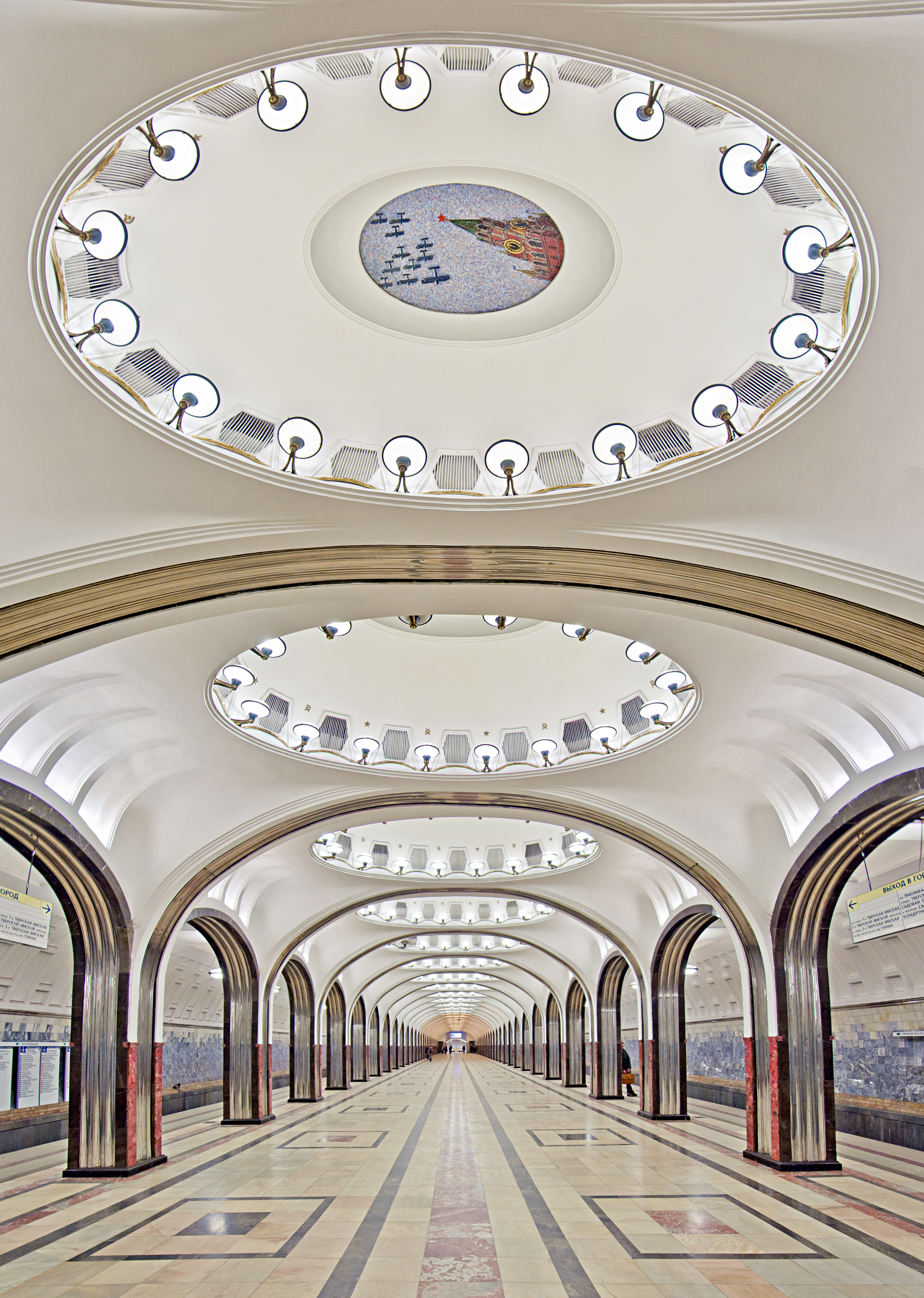 Станция метро Маяковская(г.Москва)